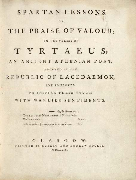 Robert and Andrew Foulis, (εκδ.) Tyrtaeus, Spartan Lessons, (Γλασκώβη 1759)